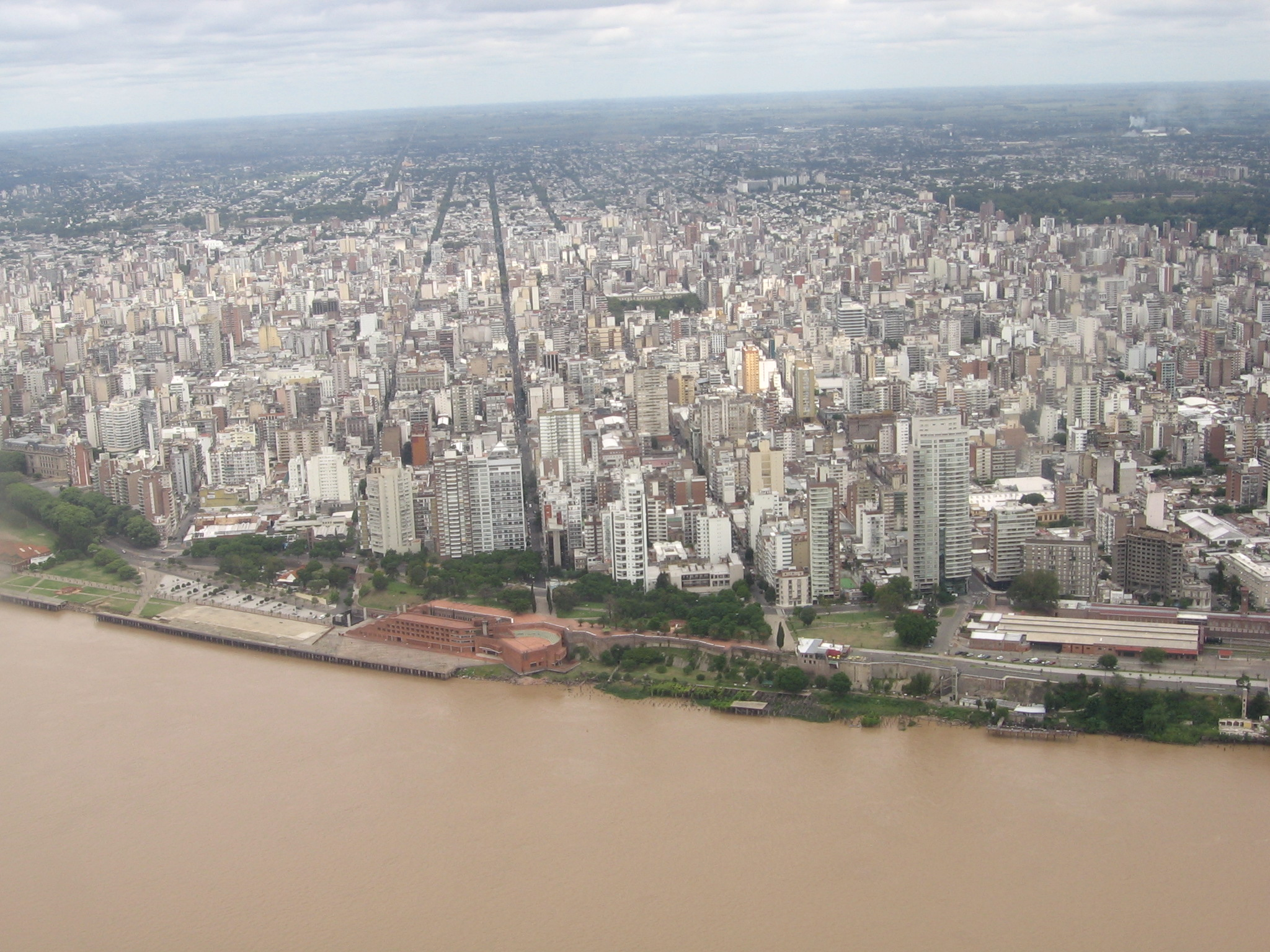 Reunión Rosarigasinos III-Flickr 25/02/2006